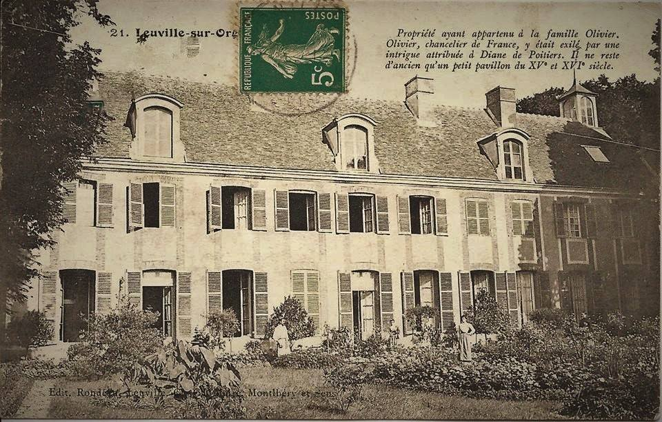 Domaine géorgien de Leuville-sur-Orge, dans l'Essone, en France : photographie du pavillon de chasse, appelé le château, prise en 1910 PD-1923